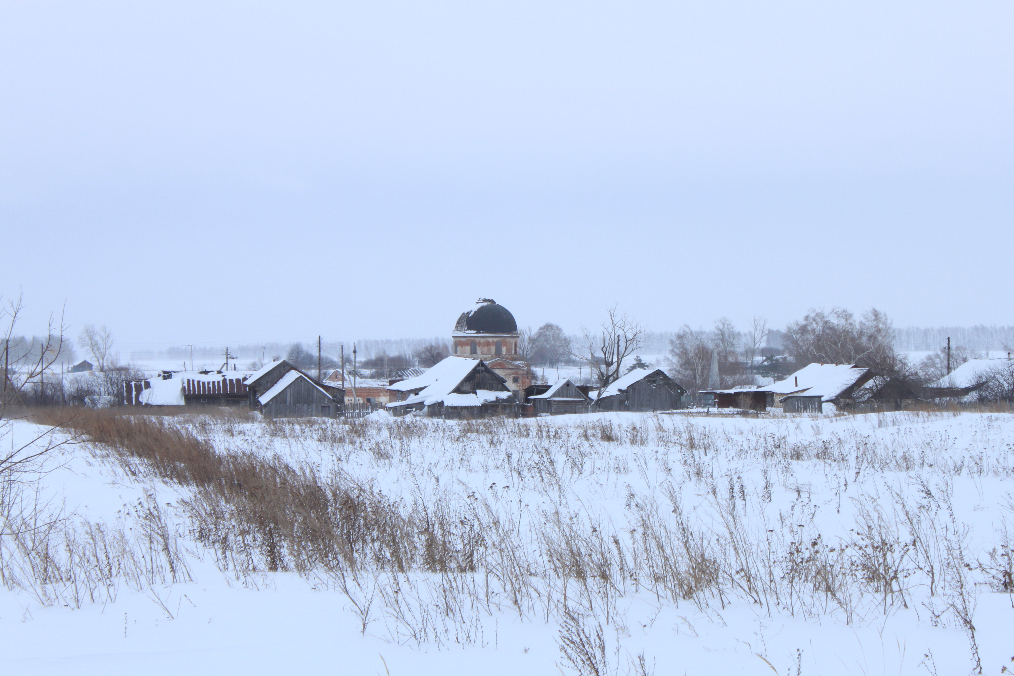 Зима в Ленинском Арзамасский район